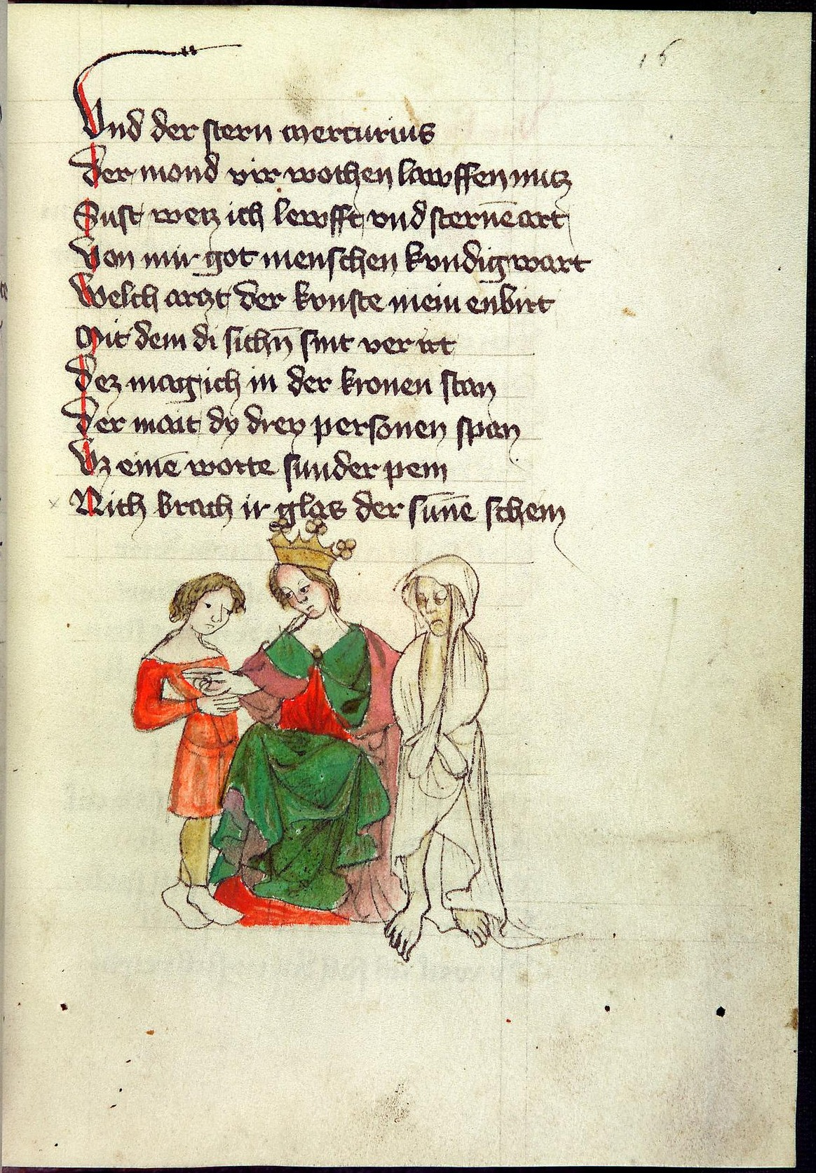 Codex Palatinus germanicus 14, Blatt 13r - Heinrich von Mügeln: Der Meide Kranz